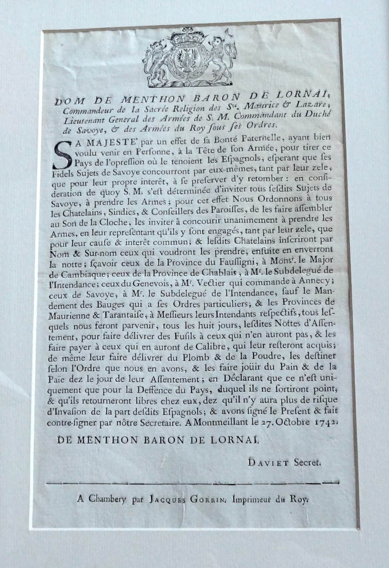 Proclamation de Claude de Menthon, baron de Lornay, lieutenant général du roi de Piémont-Sardaigne, faite à Montmeillant le 27 octobre 1742.